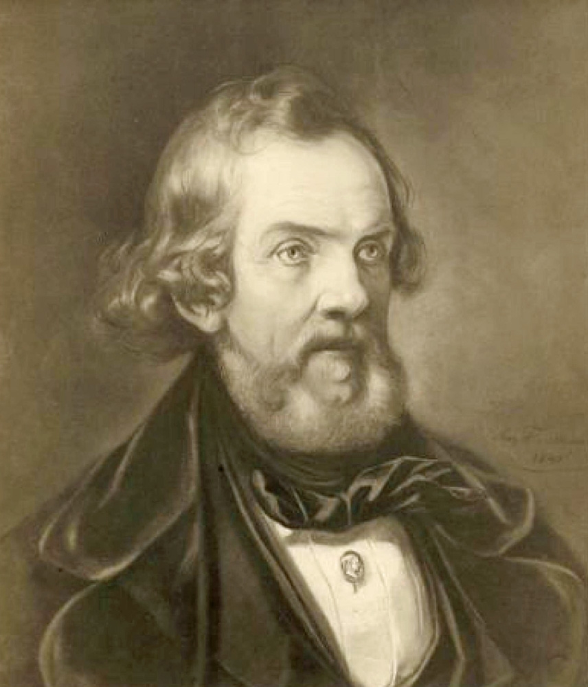 Bildnis Christoph Wilhelm Leonhard Gerhard, Fotografie nach einem Pastell